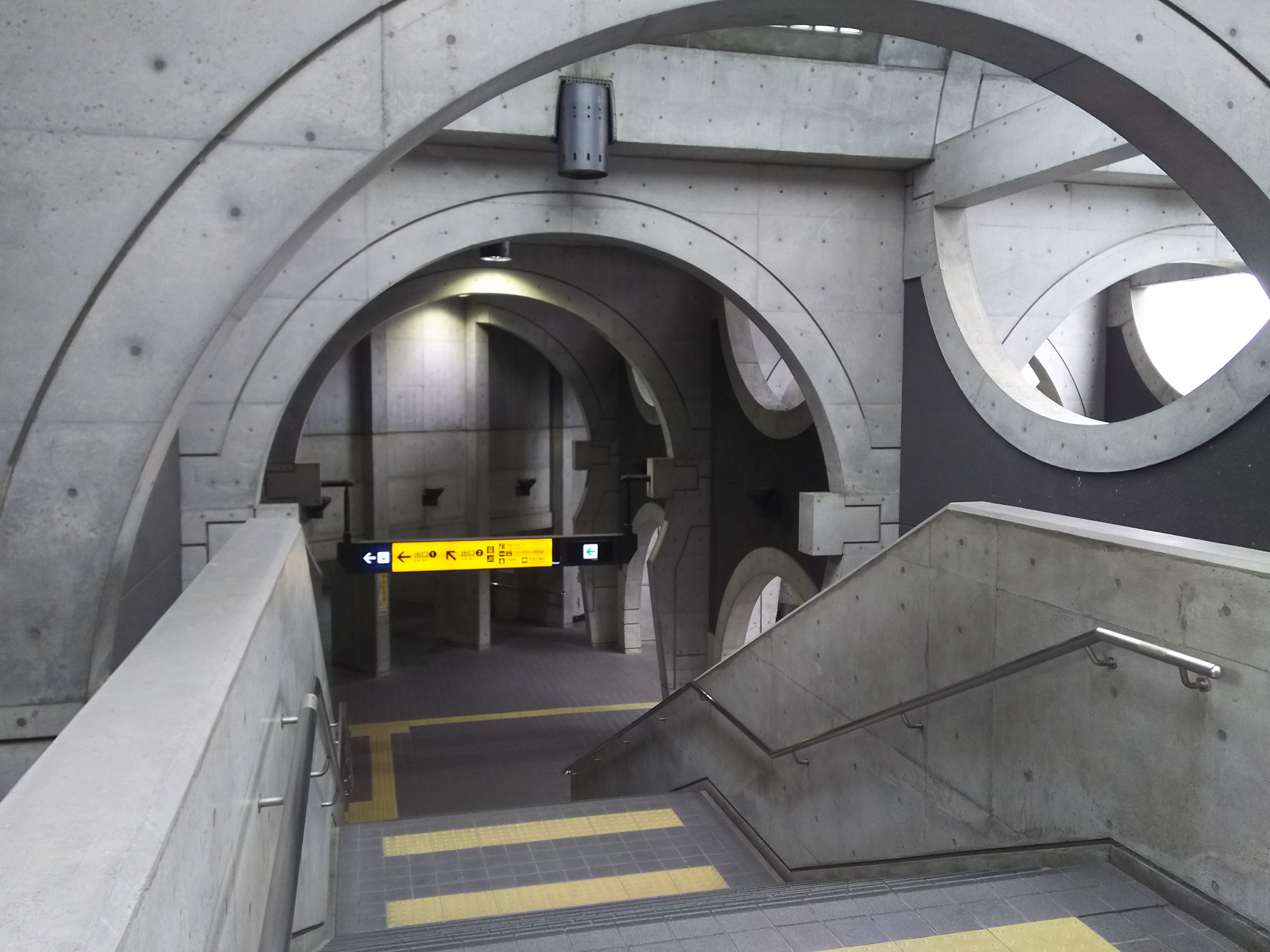 京阪宇治線宇治駅構内（京都府宇治市）